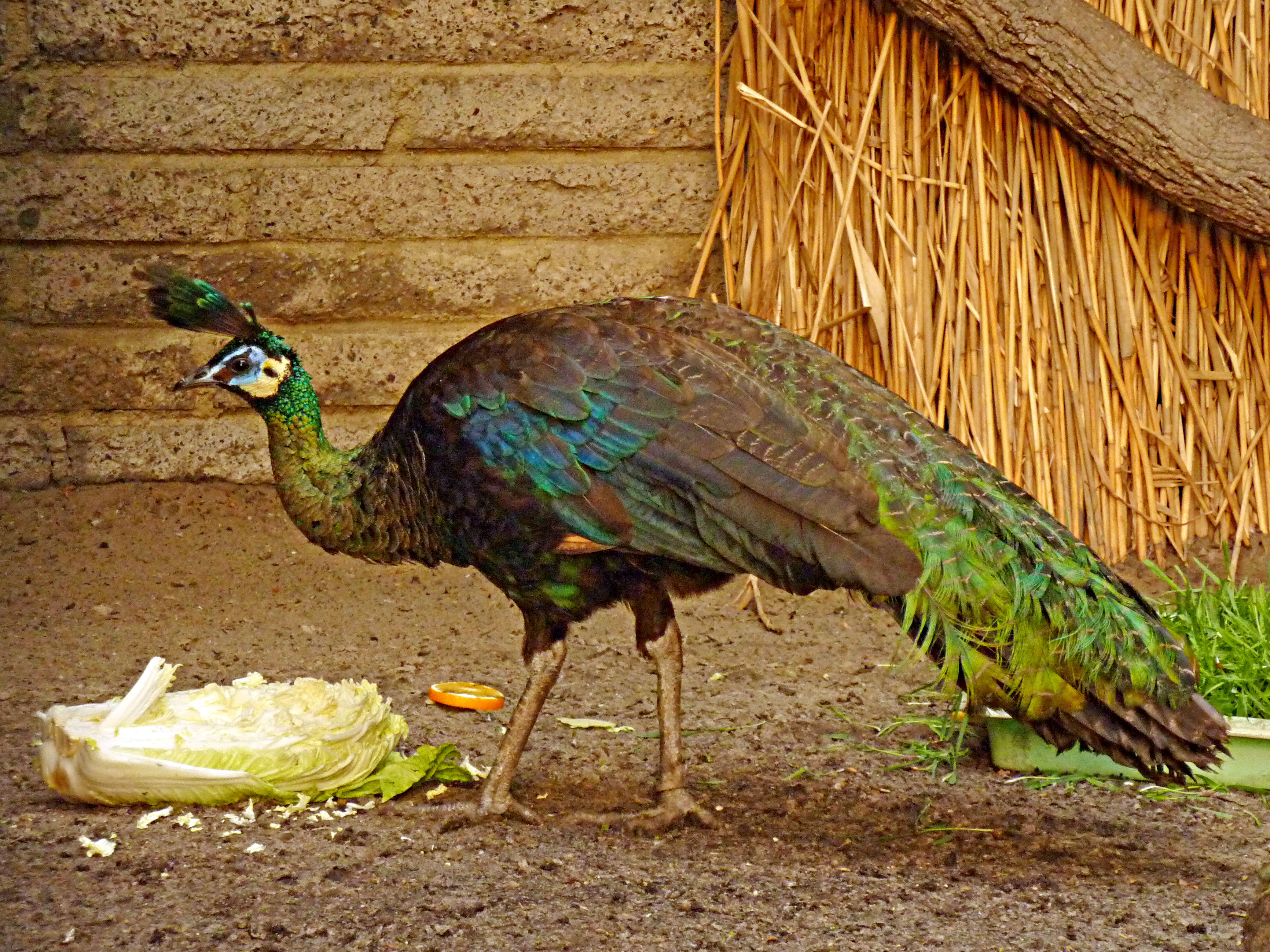 Männlicher Ährenträgerpfau (Pavo muticus, auch 'Grüner Pfau') in der Fasanerie des Tierparks Berlin-Friedrichsfelde.